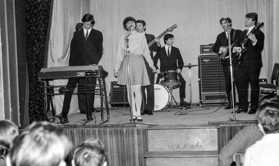 A Metró együttes koncertje. Rédey Gábor, Zalatnay Sarolta, Zorán Sztevanovity, Veszelinov András, Dusán Sztevanovity, Schöck Ottó.